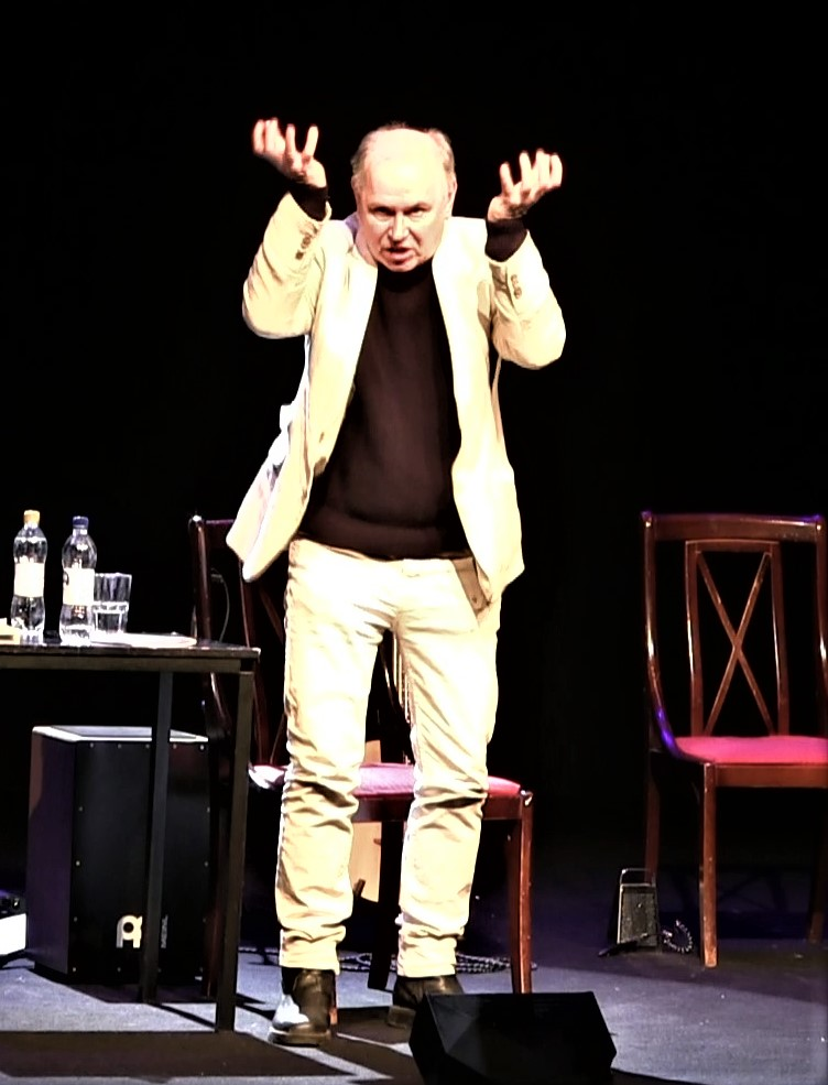 Anders Larsson framför Kalevala på trekvart Lilla Teatern 2019